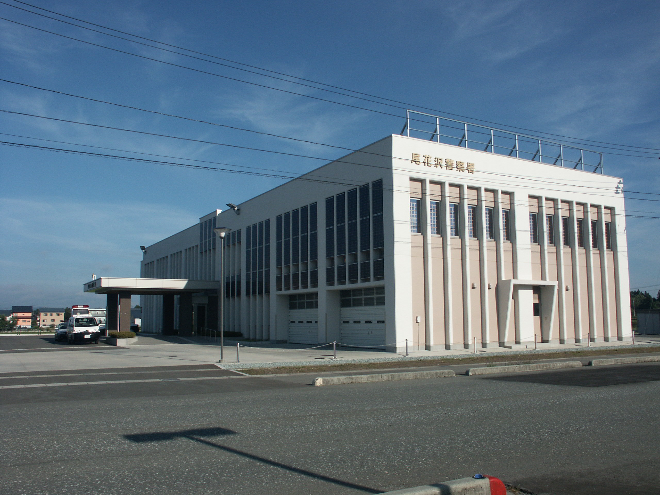 尾花沢警察署庁舎